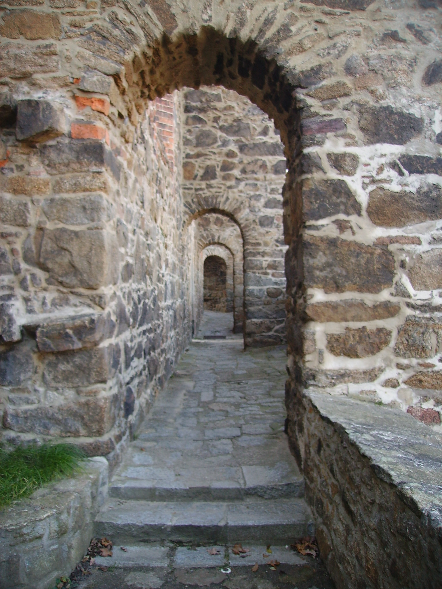 Nikolaikirchruine in Bautzen, Wehrgang an der Nordseite. Hornjoserbsce: Ruina Mikławskeje cyrkwje; woborna chódba při sewjernym boku.